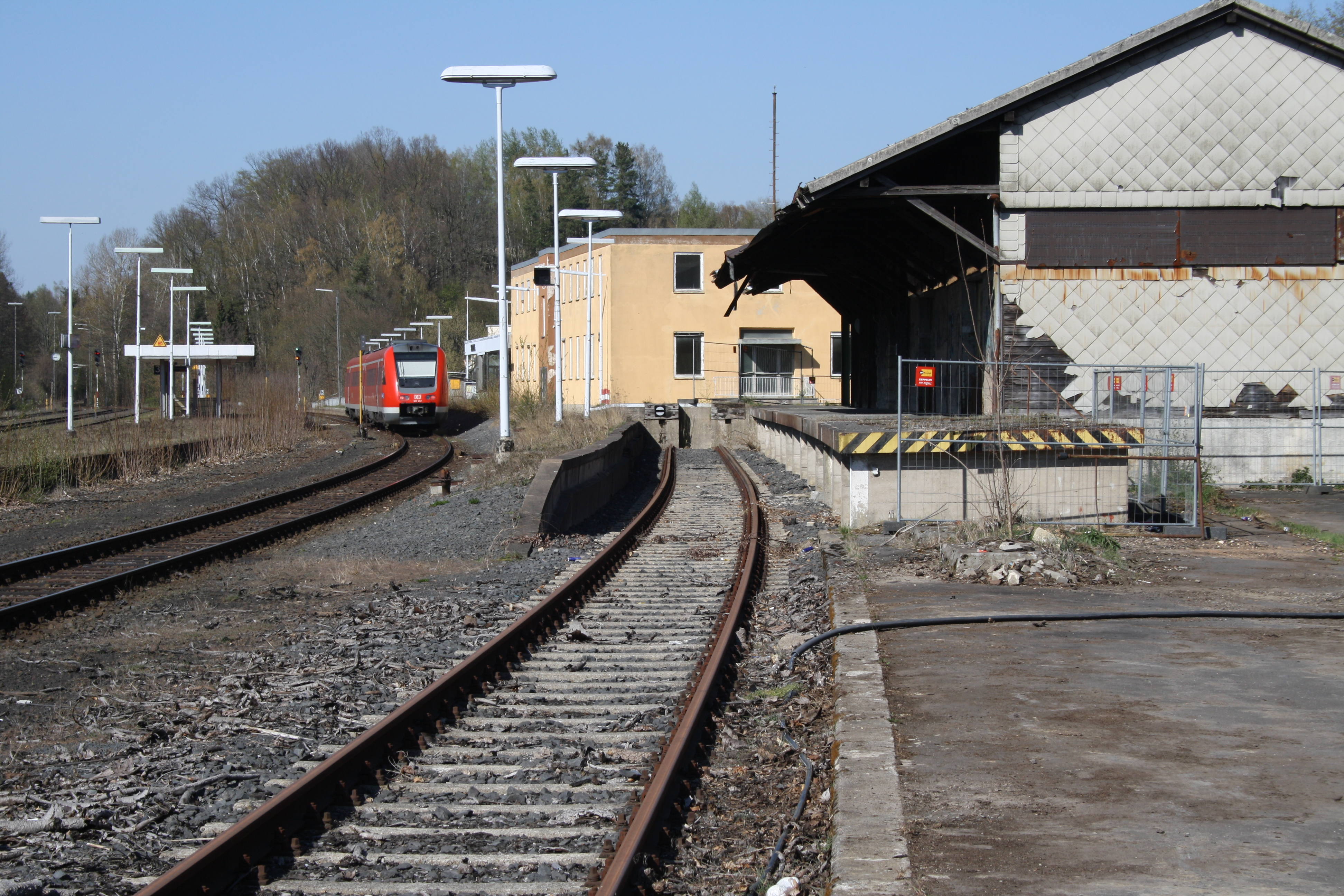 Bahnhof Schirnding mit Triebzug der Baureihe 612